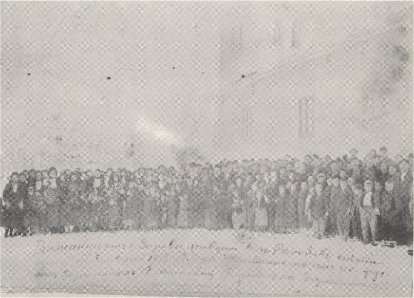 Бежанци от Зарово в Самоков, 1913 година.